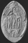 Garai János (1292 k.–1357) veszprémi püspök főpapi pecsétje